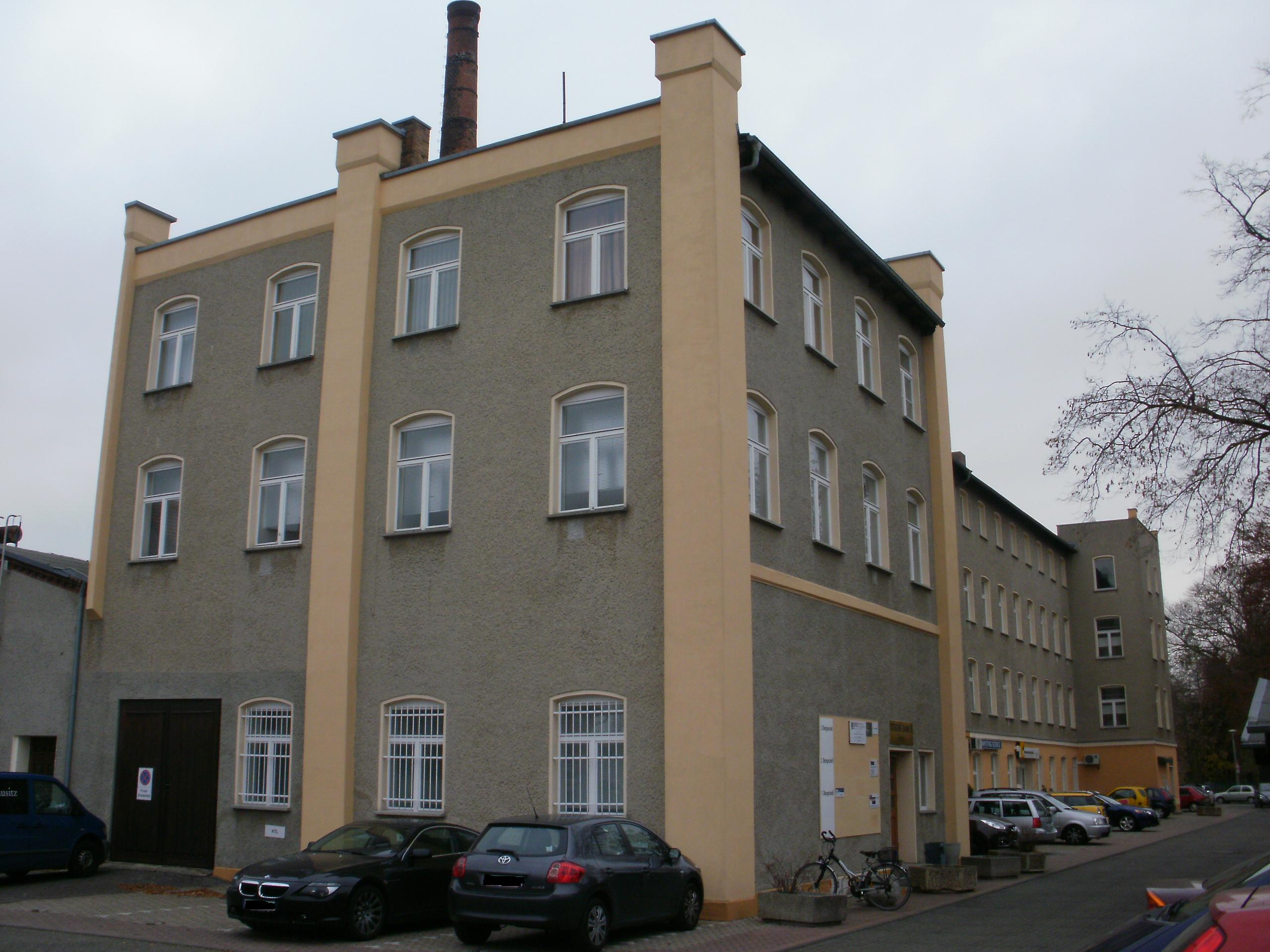 Ehemalige Tuchfabrik Ostrower Damm 10, Cottbus